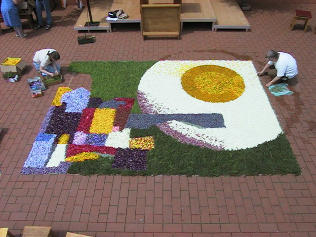 Blumenteppich der Kath. Gemeinde St. Kilian aus Bad Liebenstein in Thüringen. Thema: “Das himmlische Jerusalem”